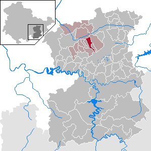 Oberoppurg in Thuringia - Saale-Orla-Kreis